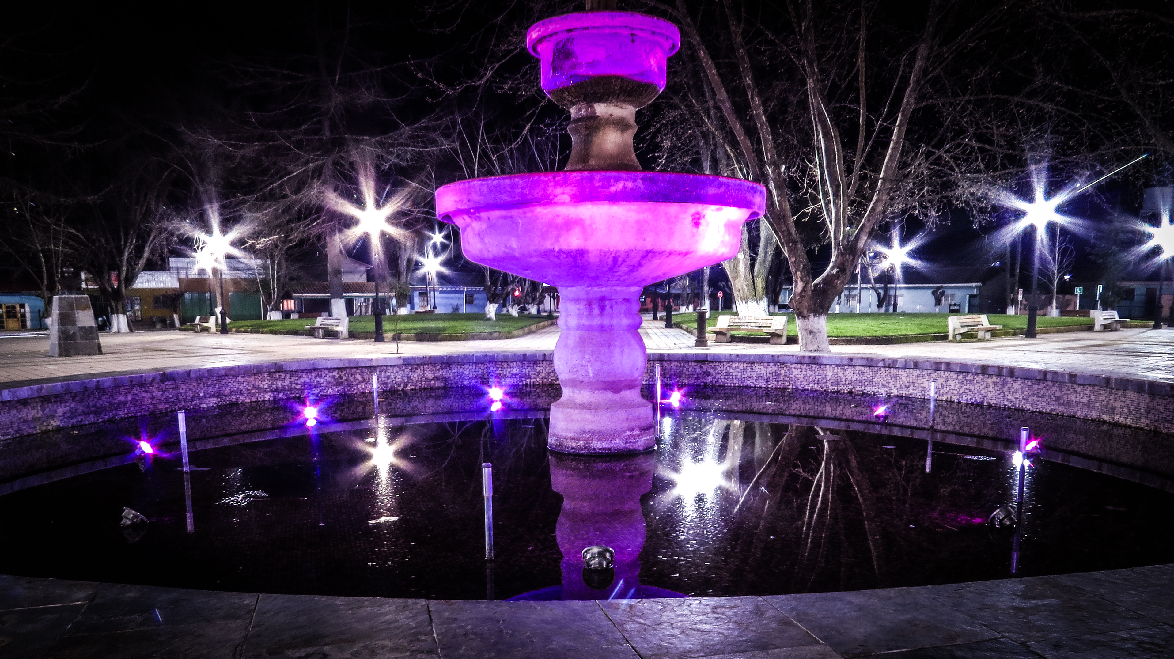 Plaza San Gregorio vista Nocturna de la fuente en el centro iluminada.